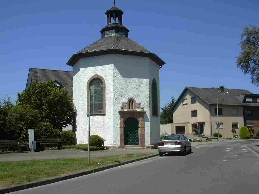 Gürzenich, Kapelle Own Work papa1234 2006-07-14